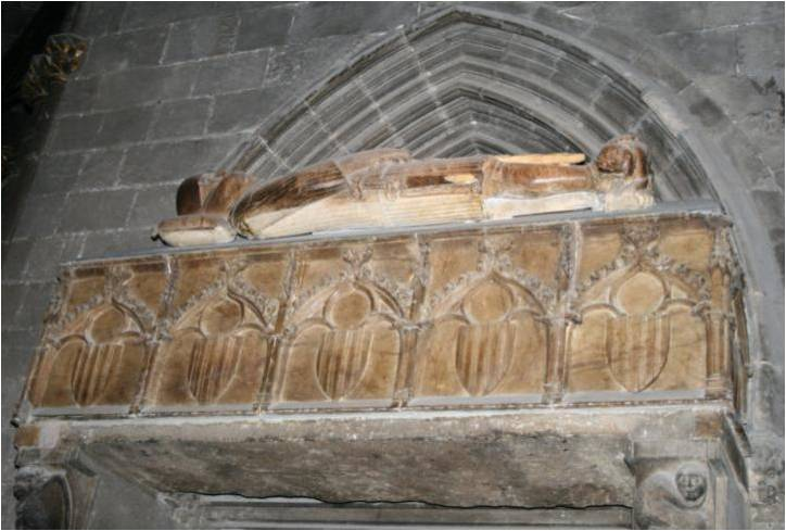 Llit